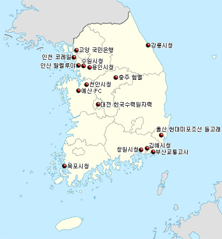 2010 National League Map